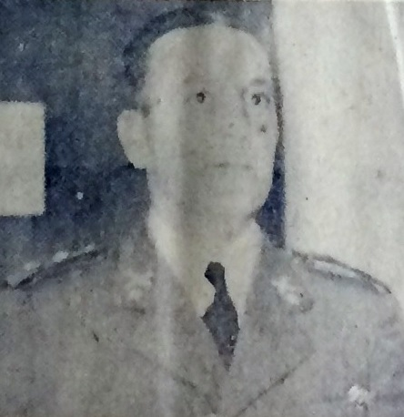 Juan Carlos Sanguinetti, Interventor de facto de la provincia de Buenos Aires.